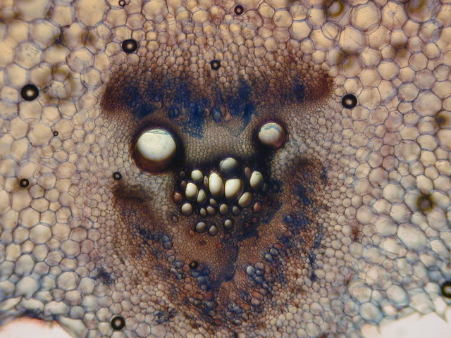 (Vascular tissue) offenes, bikollatereales Leitbündel bei cucurbita pepo